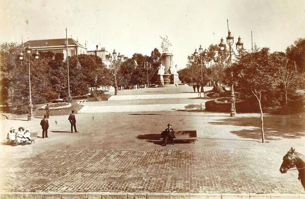 Plaza Francia y monumento a Francia. En el banco el ingeniero Carlos Thays, ex director de paseos.